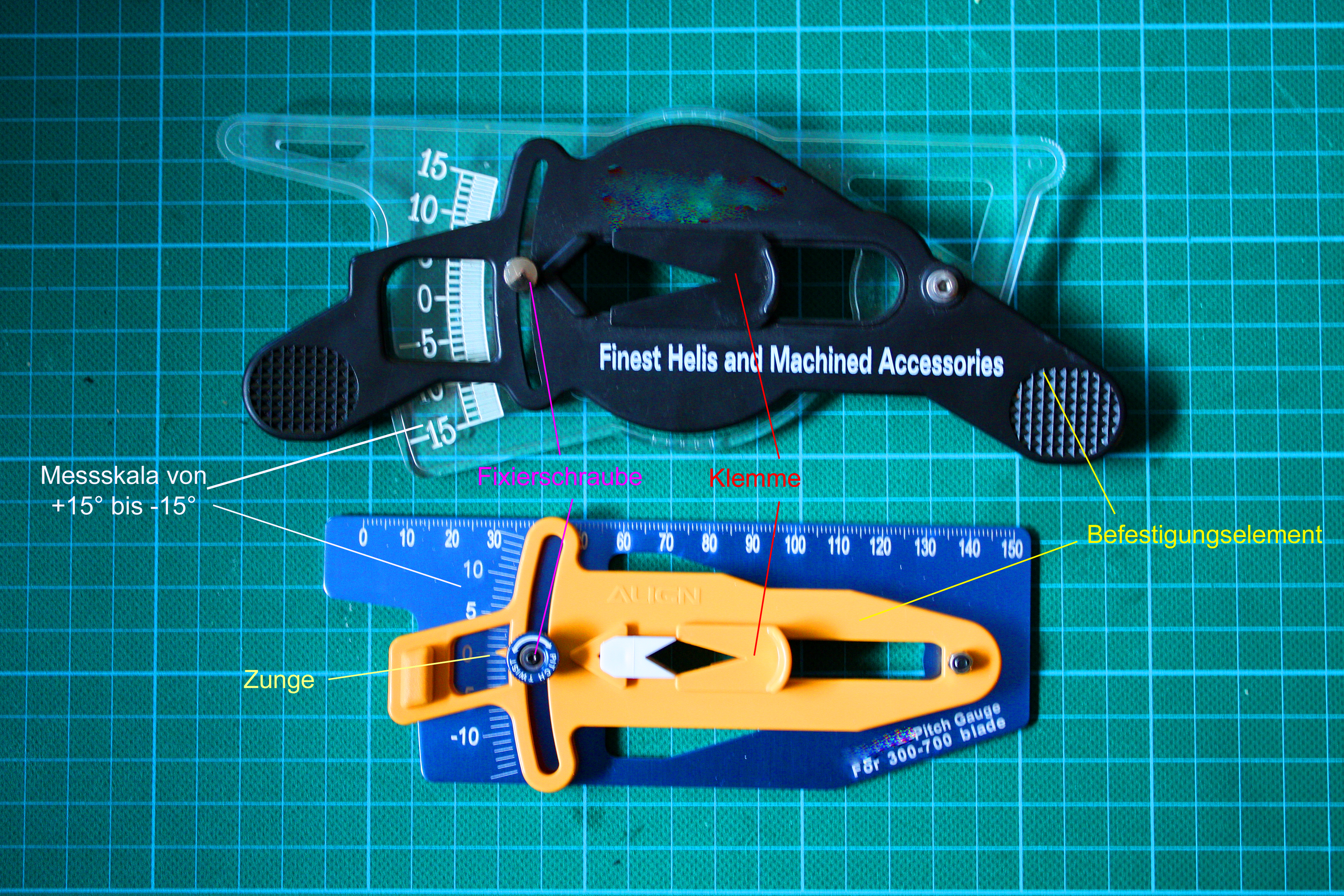 Zwei Pitchlehren für RC-Modellhubschrauber - two pitch gauches für rc-helicopters